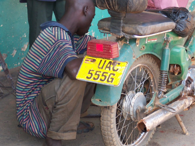 Moped Boda-boda (bicycle taxi) in Uganda.